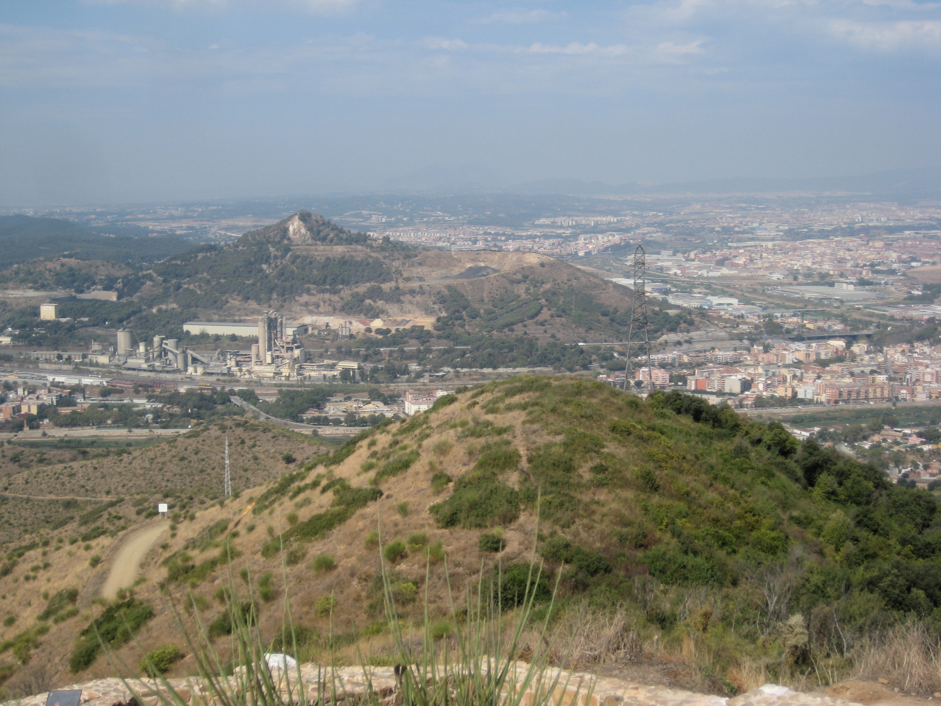 Vista del Turó de Montcada des del Puig Castellar. A l'esquerra, fàbrica de ciment Lafarge Asland, creada el 1917 i que extreu material del Turó de Montcada